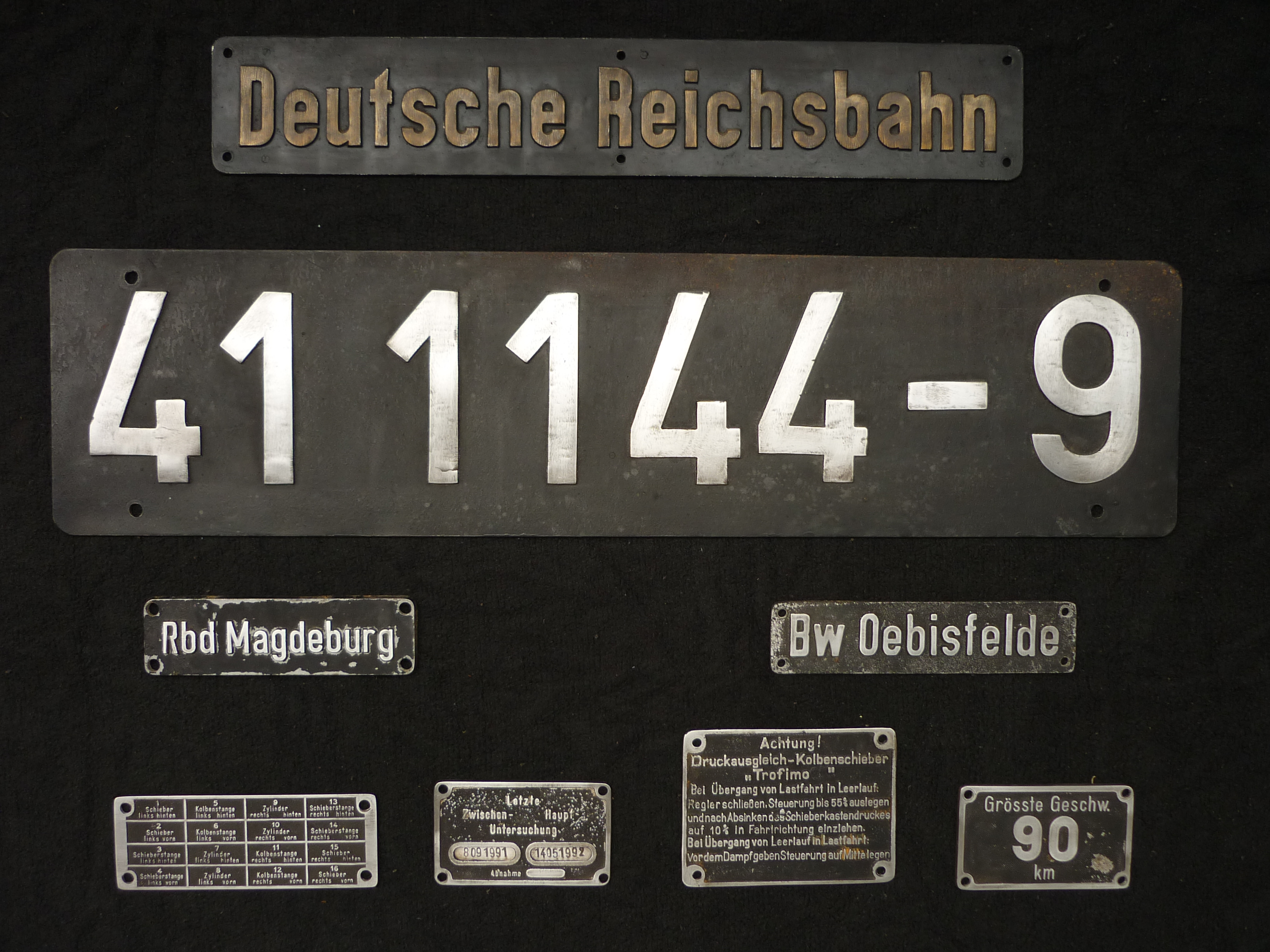 Gelaufener Schildersatz der 41 1144-9. Zu sehen sind auch Schilder aus dem Führerstand eben jener Lok, so die Anschlussnummern der Schmierölleitungen, Kessel-Fristverlängerung (Lok war zu dem Zeitpunkt Heizlok), die Anweisung über die Handhabung des Druckausgleichs sowie die zulässige Höchstgeschwindigkeit. Bei Fristablauf 1992 konnte noch niemand ahnen, das sie mal eine betriebsfähige Museumslok sein würde.